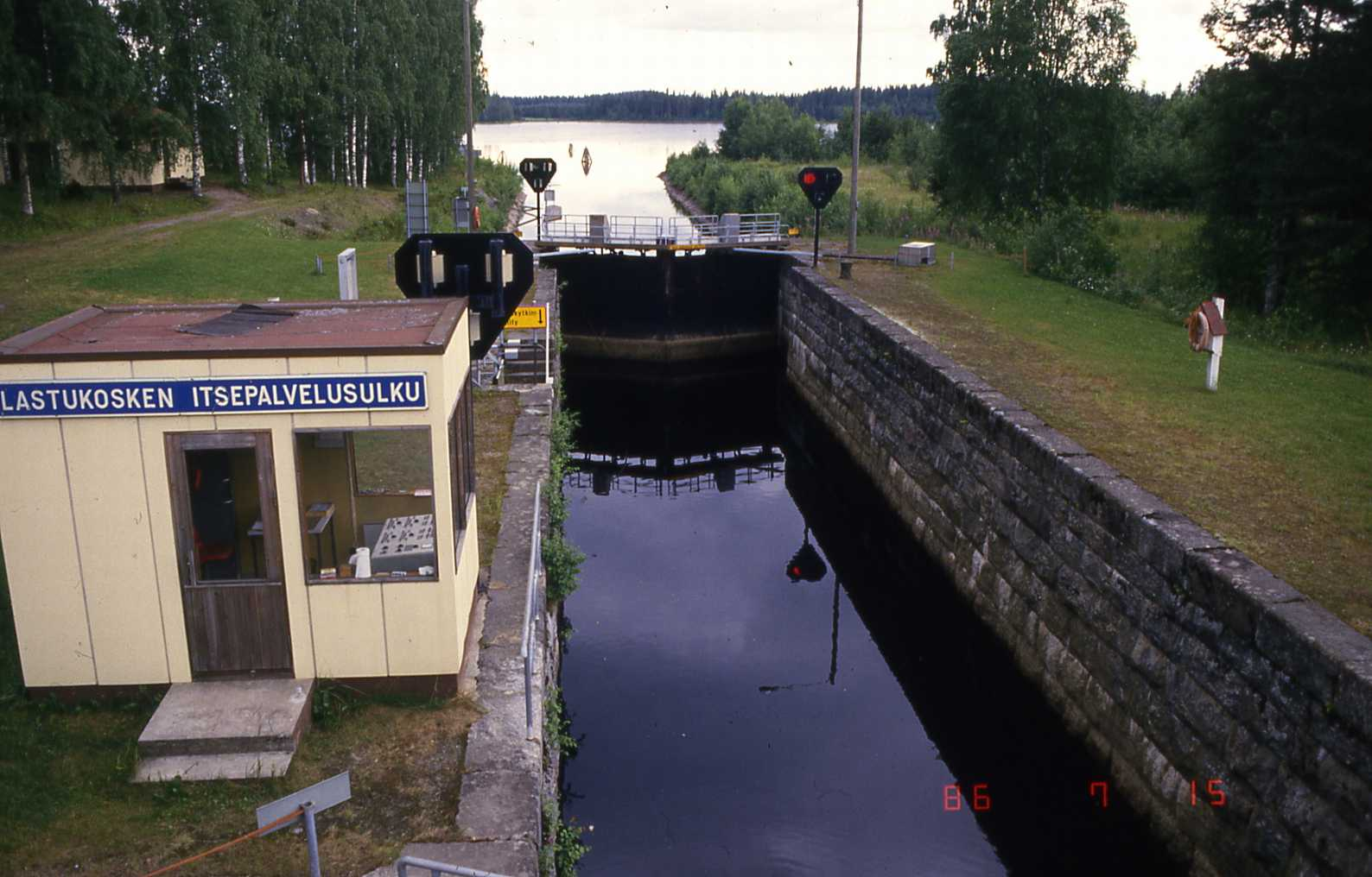 Lastukosken kanava